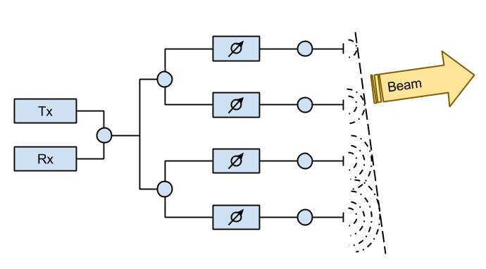 パッシブ・フェーズドアレイ・アンテナのメカニズム。